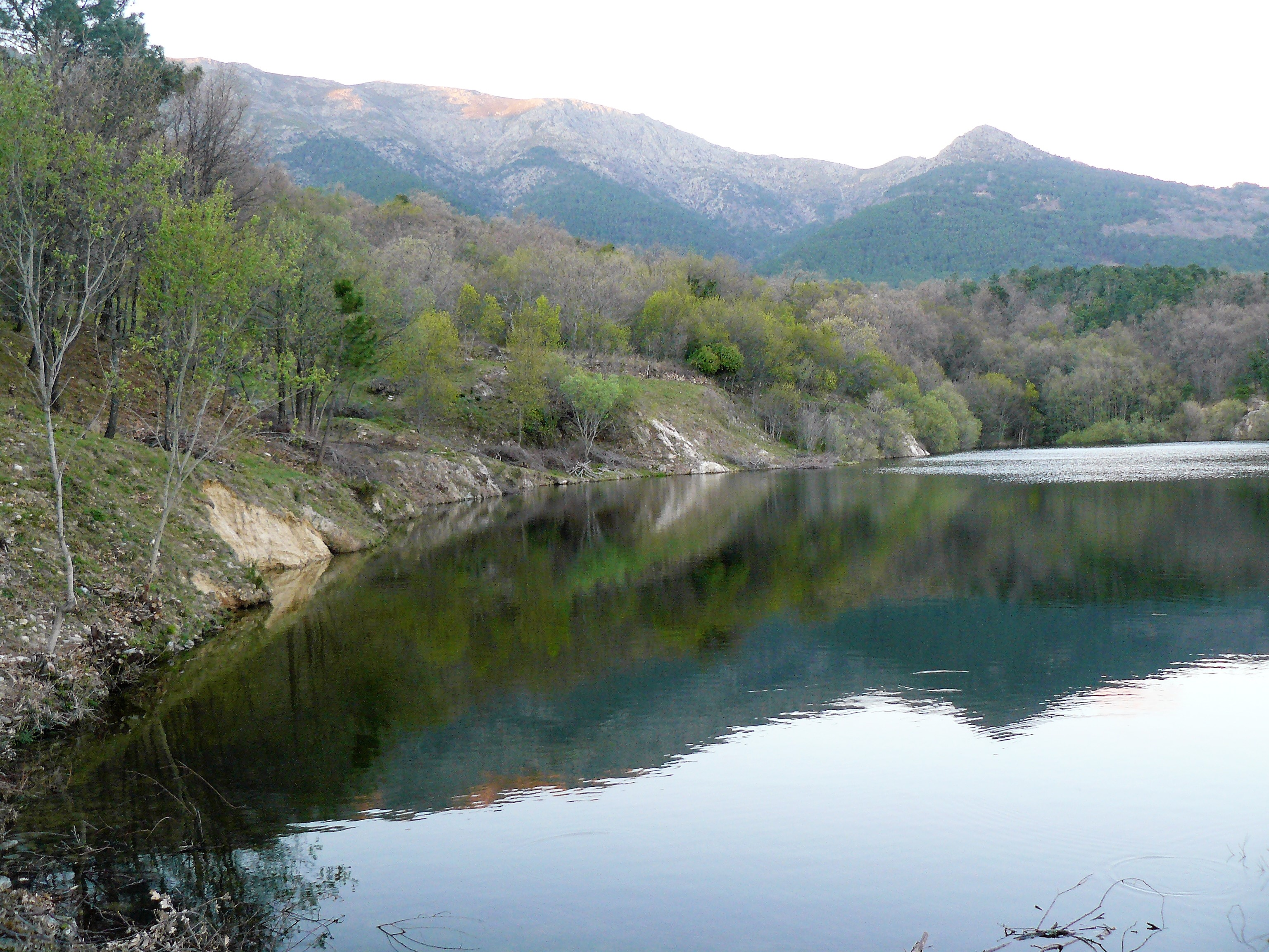 Sierra de Gredos This is a photography of a Special Area of Conservation in Spain with the ID: ES4110002. Natura2000 entry, EEA entry